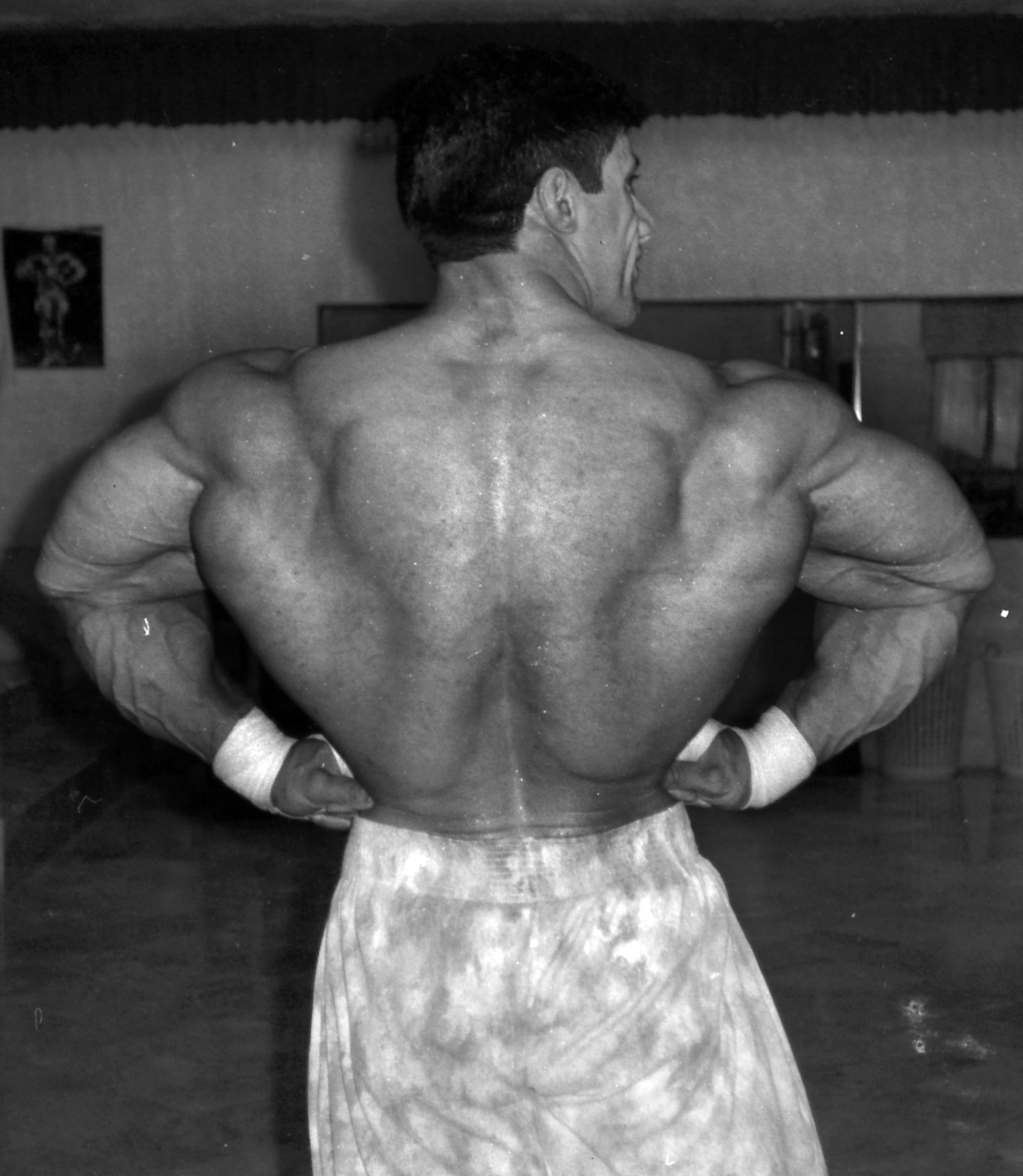 تصویری كه سه هفته پيش از مسابقات آسیایی پوسان (2001م.) از علي تبريزي گرفته شده است، فرم و توانايي بالاي بدني وي را بوضوح نشان مي دهد.